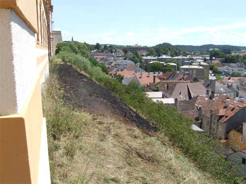 Abgebrannte Fläche des Flurbrands am Melker Stiftsfelsen